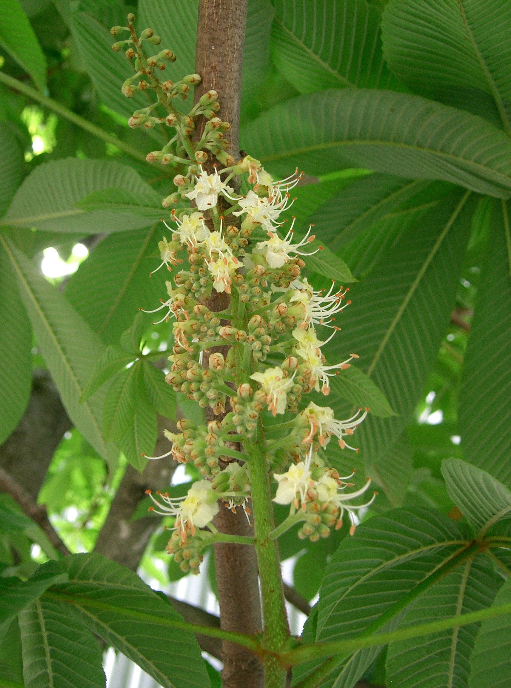 Aesculus turbinata